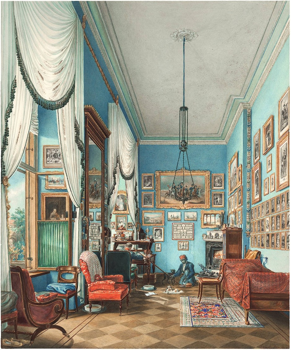 Johannes Rabe: Prinz Albrecht von Preußen in seinem Arbeitszimmer, 1853, Aquarell, 37 mal 31 Zentimeter. 2017 verkauft bei Bassenge für 38000 Euro (Schätzpreis 3500)